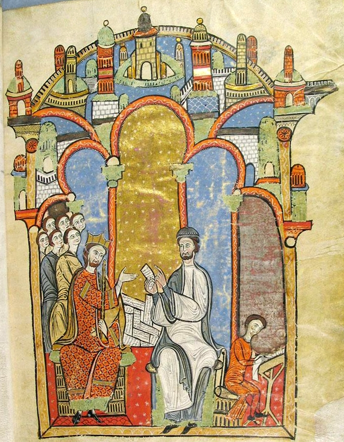 Alfonso II de Aragón (a la izquierda) ordena junto a Ramón de Caldes la documentación destinada a la compilación del cartulario real. Detalle de la portada de dicha compilación documental, conocida como Liber feudorum maior (siglo XIII).